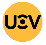 Logo de la Corporación De Televisión De La Pontificia Universidad Católica De Valparaíso.